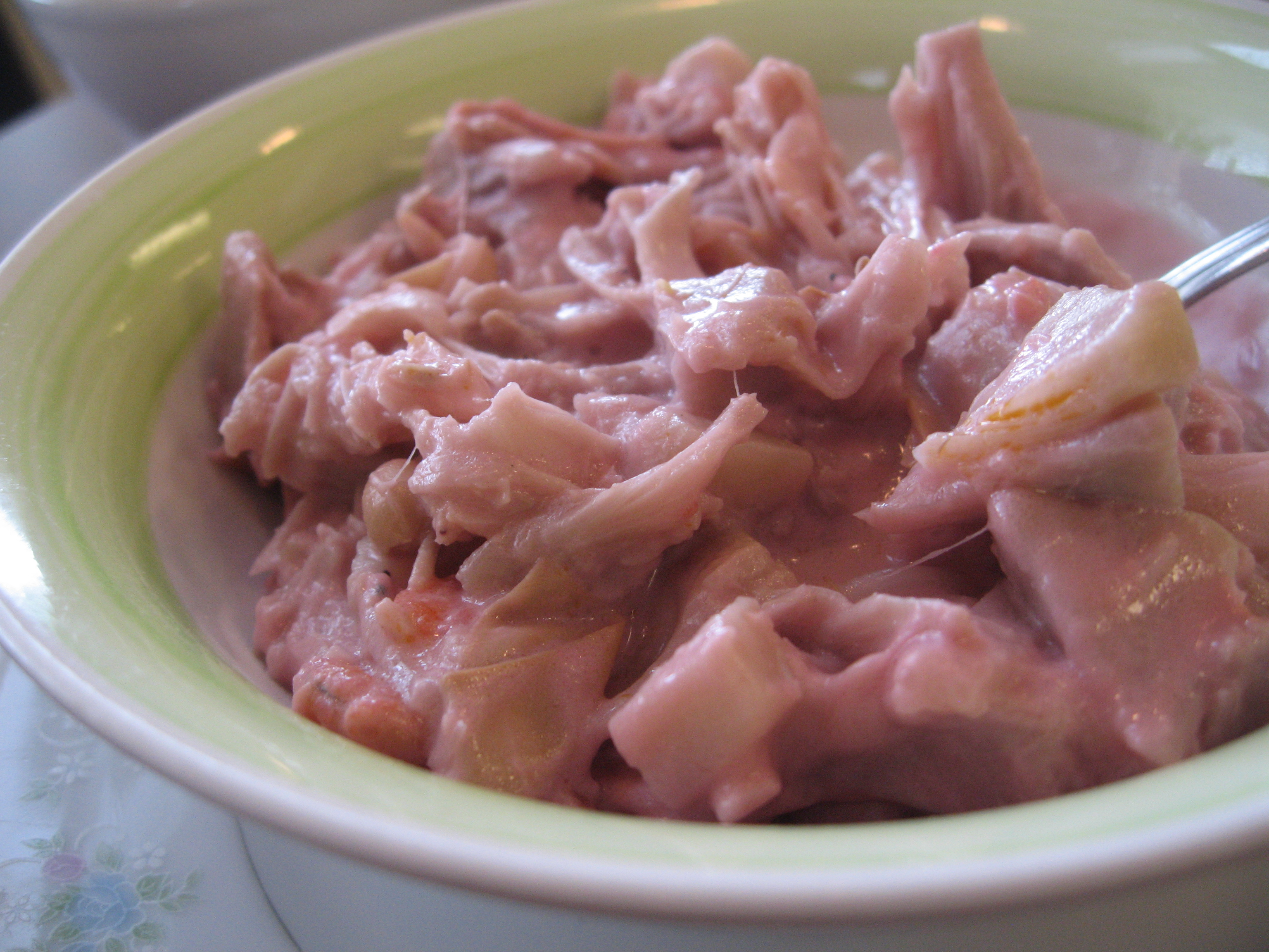 @ Tambayan